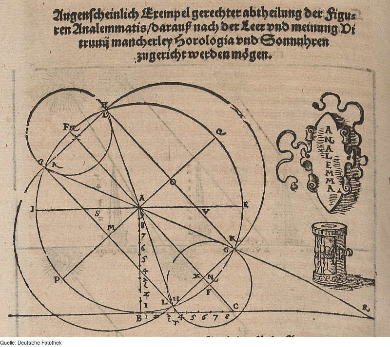 Original image description from the Deutsche Fotothek Astronomie & Gnomonik & Sonnenuhr